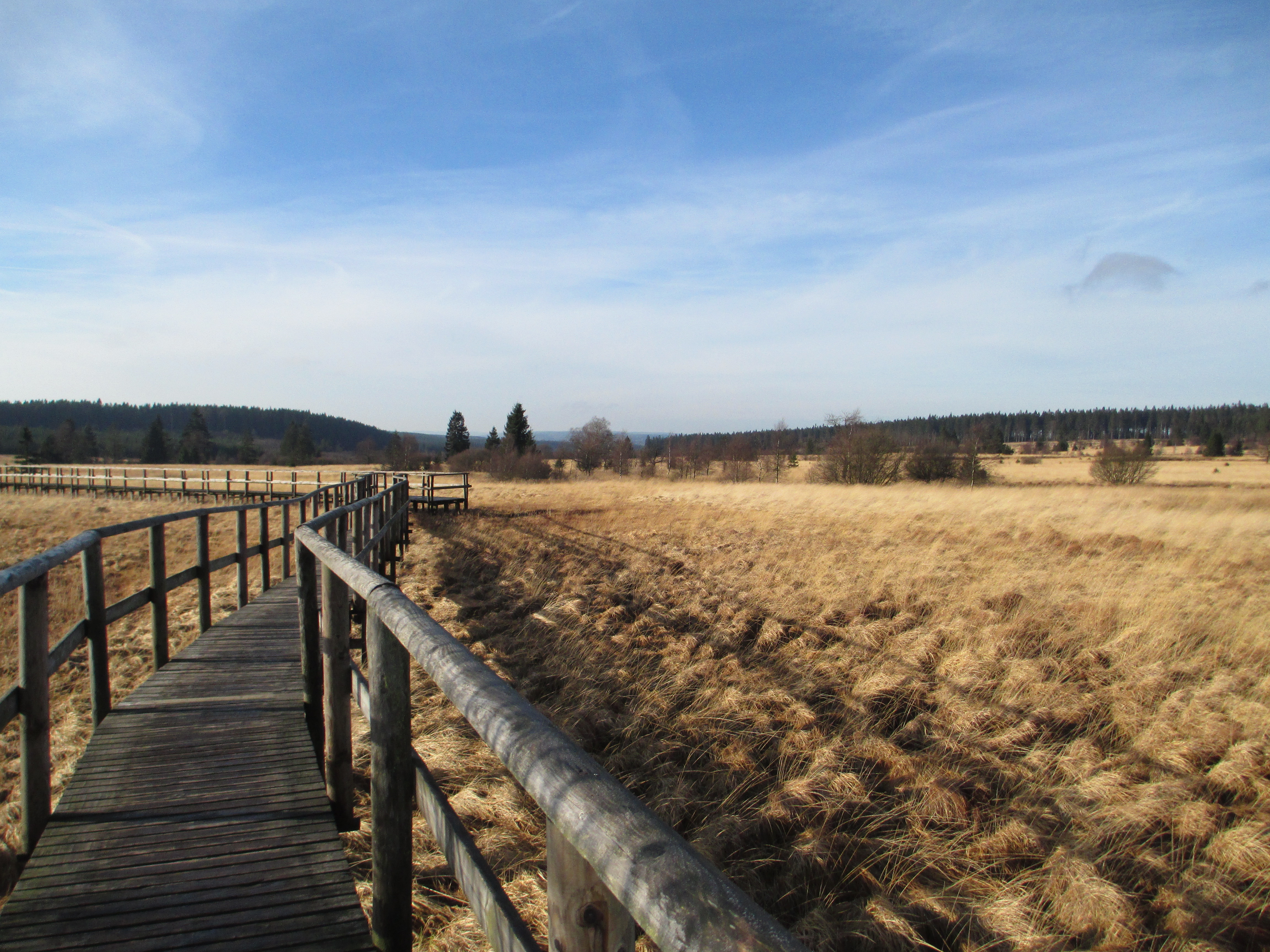 Vue sur la Fagne de la Poleur sur le Plateau des Hautes Fagnes de l'Ardenne en Wallonie (Belgique)